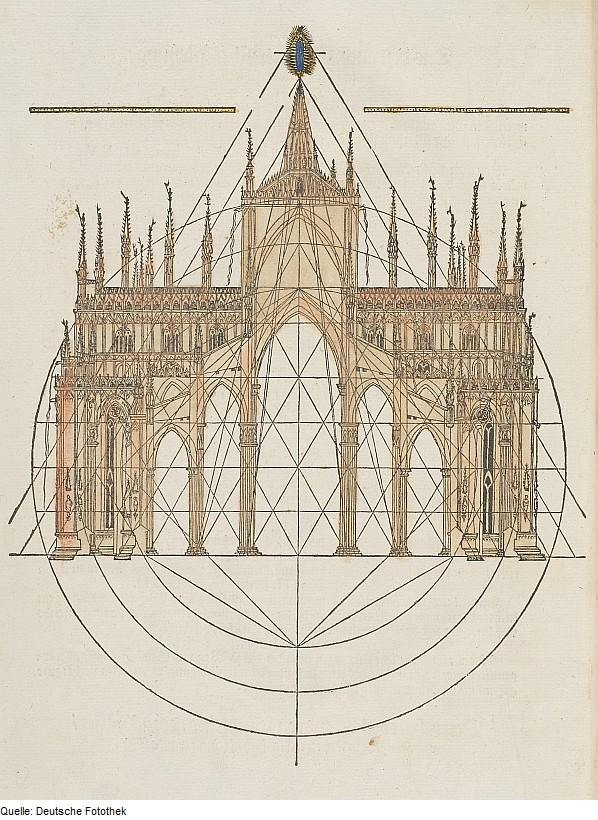 Original image description from the Deutsche Fotothek Architektur & Mathematik & Mechanik & Mailänder Dom & Schnitt